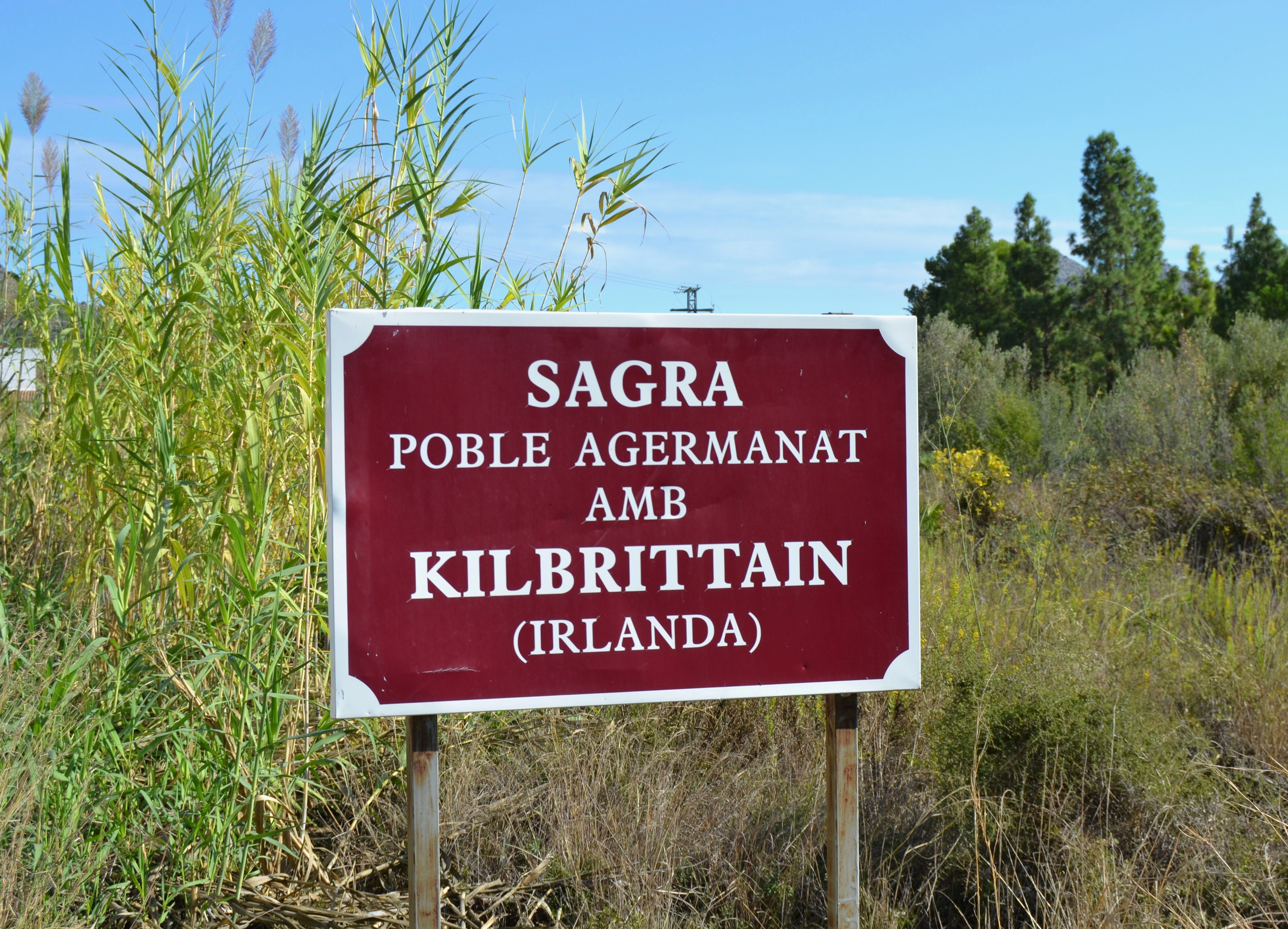 Sagra, poble agermanat amb Kilbrittain.